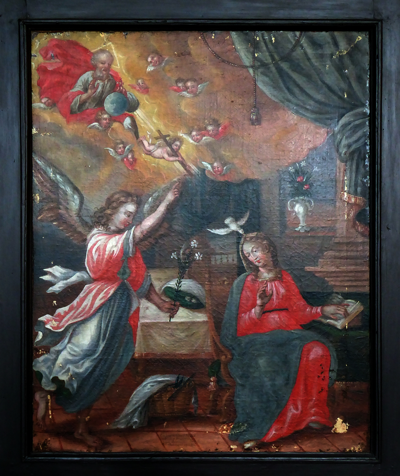 Maria und die Taube, Gemälde, Chapelle du Vorbourg